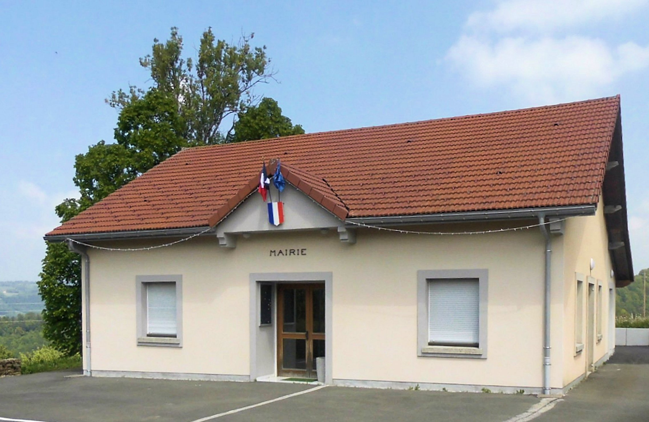 La mairie de Burnevillers